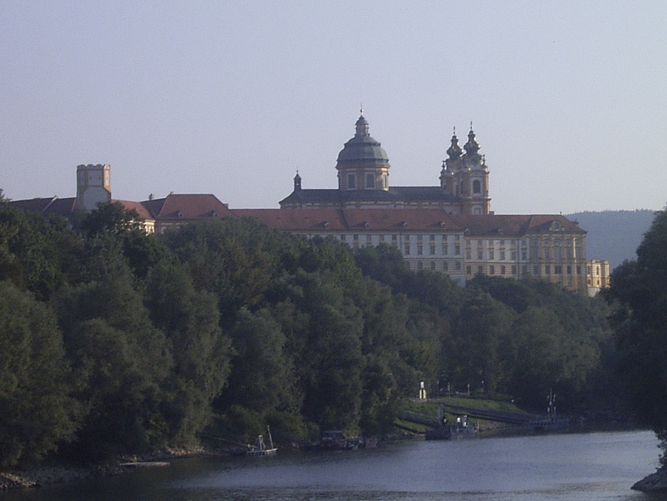 Stift Melk 2004 Autor: Denis Barthel